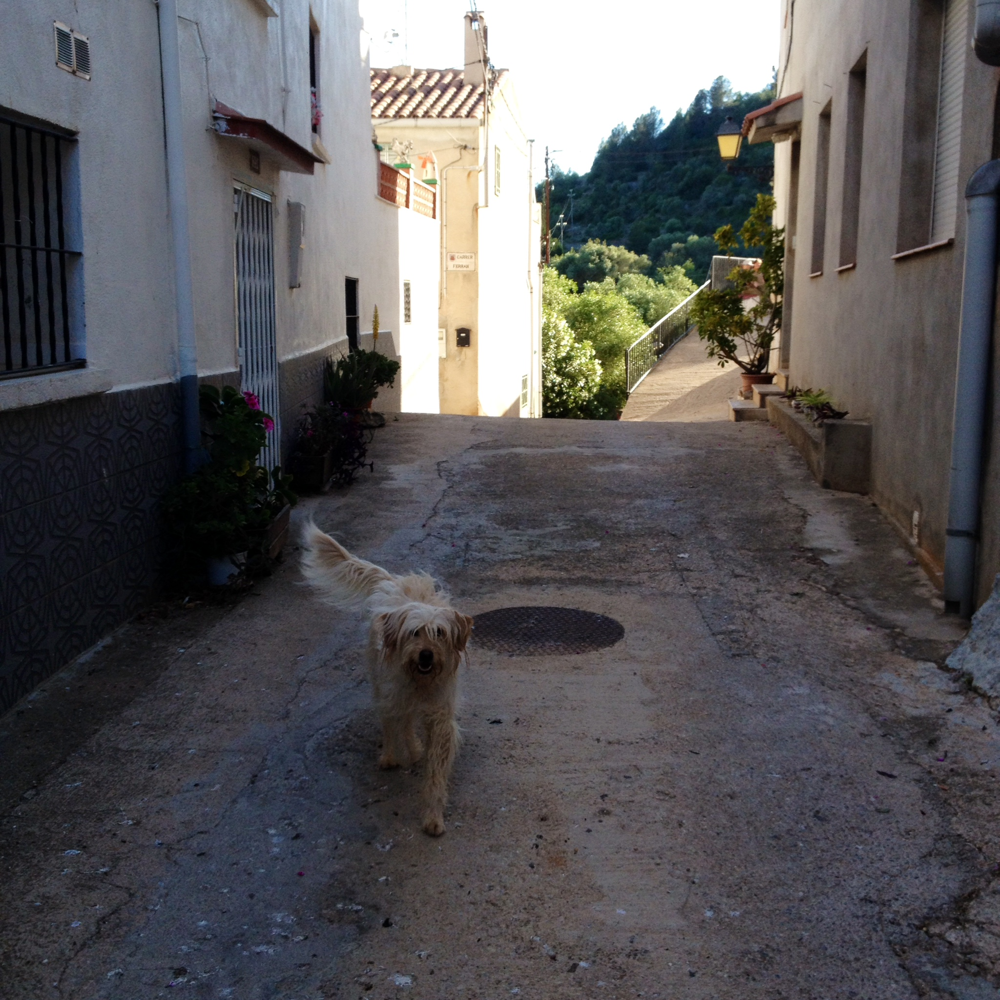 Detall d'un dels carrers de Les Ventalles.